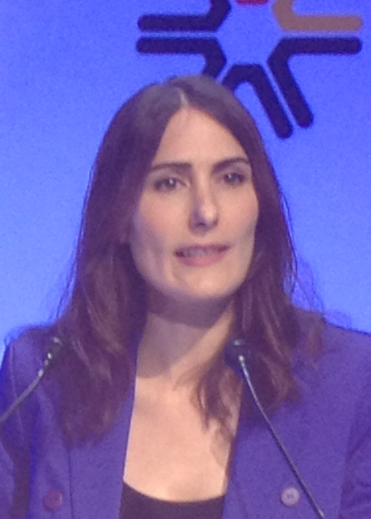 Bildinhalt: Anja Kohl spricht beim Bundesverband Deutscher Vermögensberater (BDV) in Wiesbaden Aufnahmeort: Wiesbaden, Deutschland